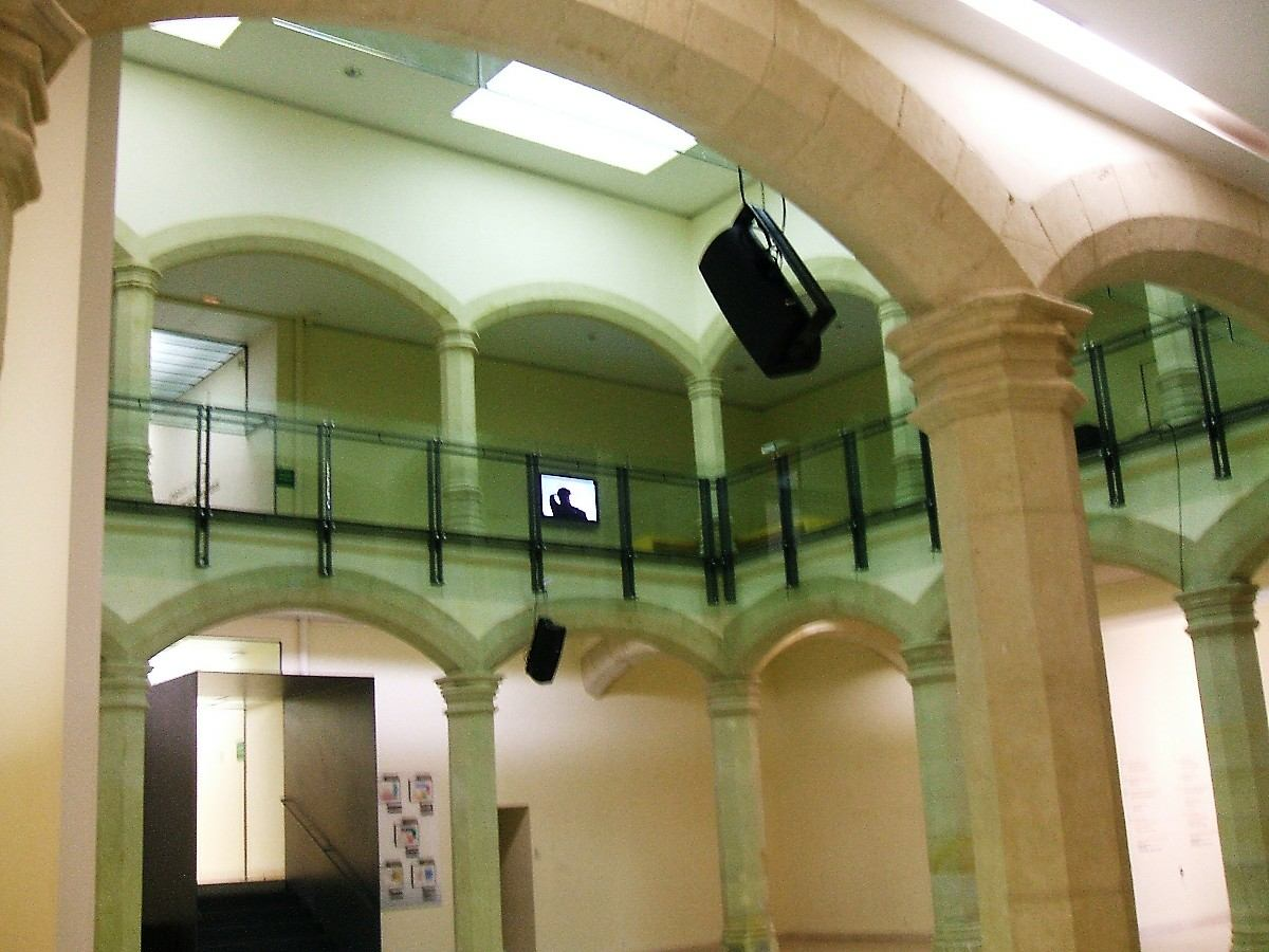 Patio interior del Palacio y Centro Cultural Montehermoso, Vitoria-Gasteiz, Euskadi, España/Spain